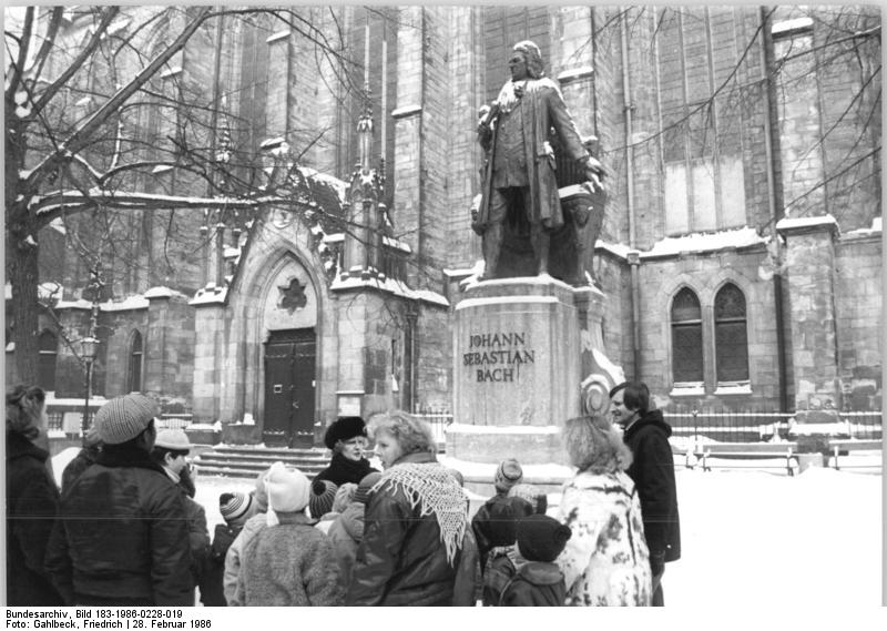 Leipzig, Bachdenkmal, Winter ADN-ZB Gahlbeck 28.2.86 Leipzig: Johann Sebastian Bach, der ehern auf hohem Sockel vor seiner Leipziger Wirkungsstätte steht, bekommt oft Besucht. Könnte er hören, würde er Äußerungen in allen DDR-Dialekten und vielen ausländischen Sprachen vernehmen. Stadtbilderklärer erzählen den Gästen, daß der große Musiker in der Thomaskirche begraben liegt, daß sich unweit des Denkmals das Bach-Museum befindet und über Leben und Werk des Meisters Auskunft gibt und daß regelmäßig Bach-Motetten in der Kirche erklingen.